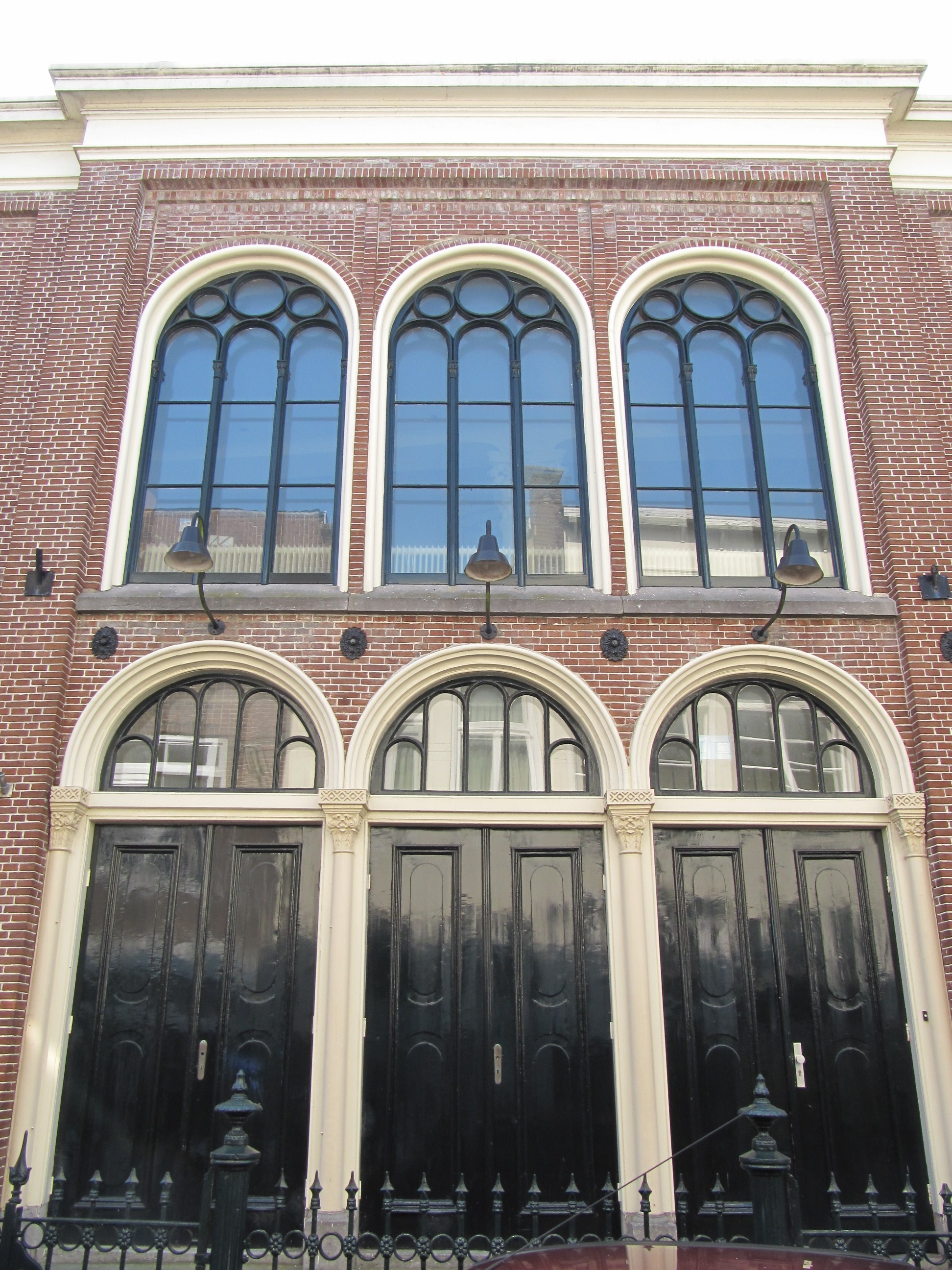 RM24354 Leeuwarden - Sacramentsstraat 19.jpg